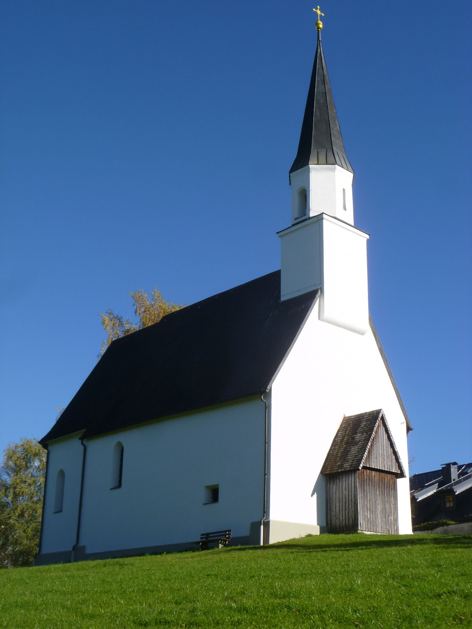 Kath. Filialkirche hl. Georg